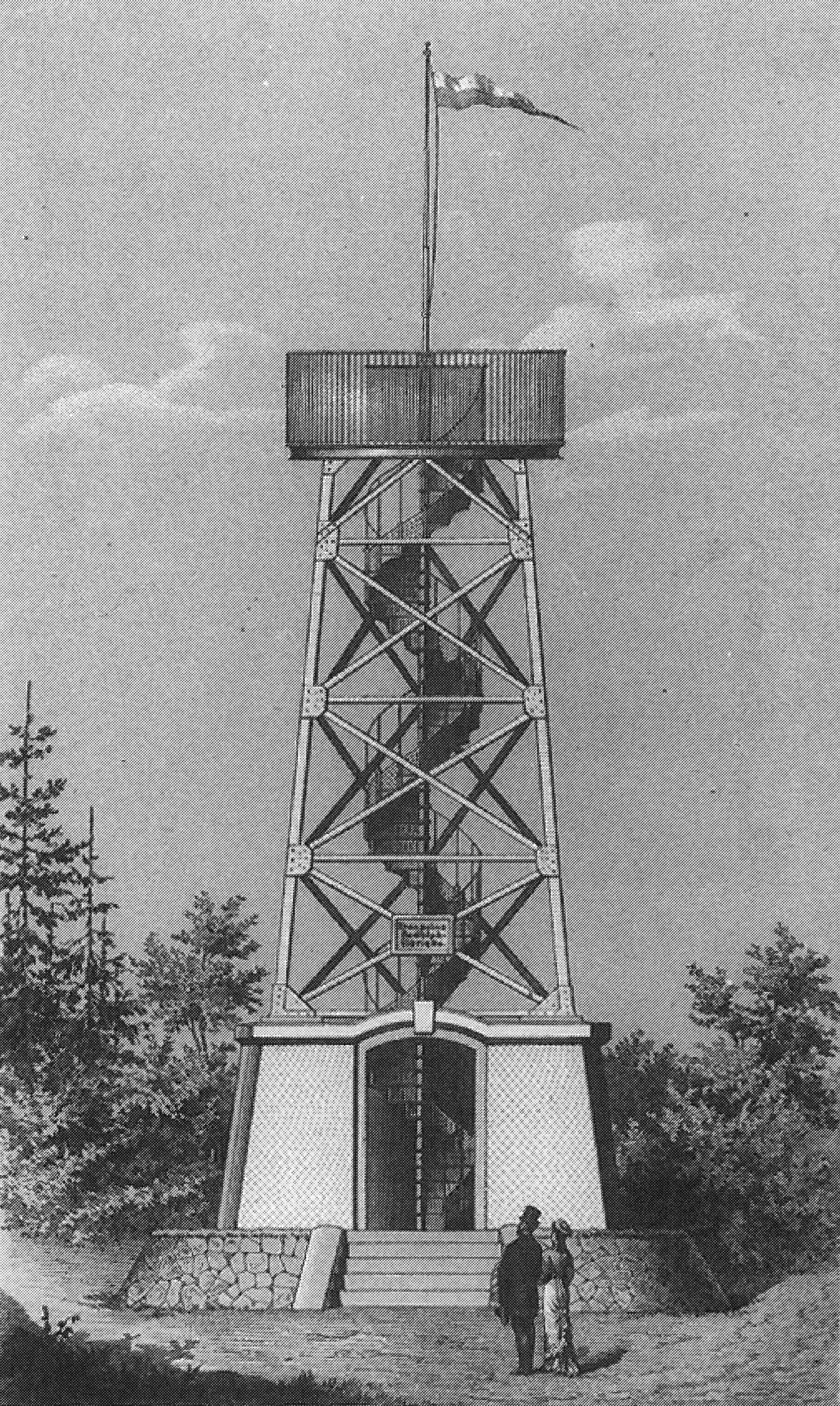 Lithographie der Kronprinz-Rudolf-Gloriette auf dem Buchkogel (1879), Graz-Straßgang